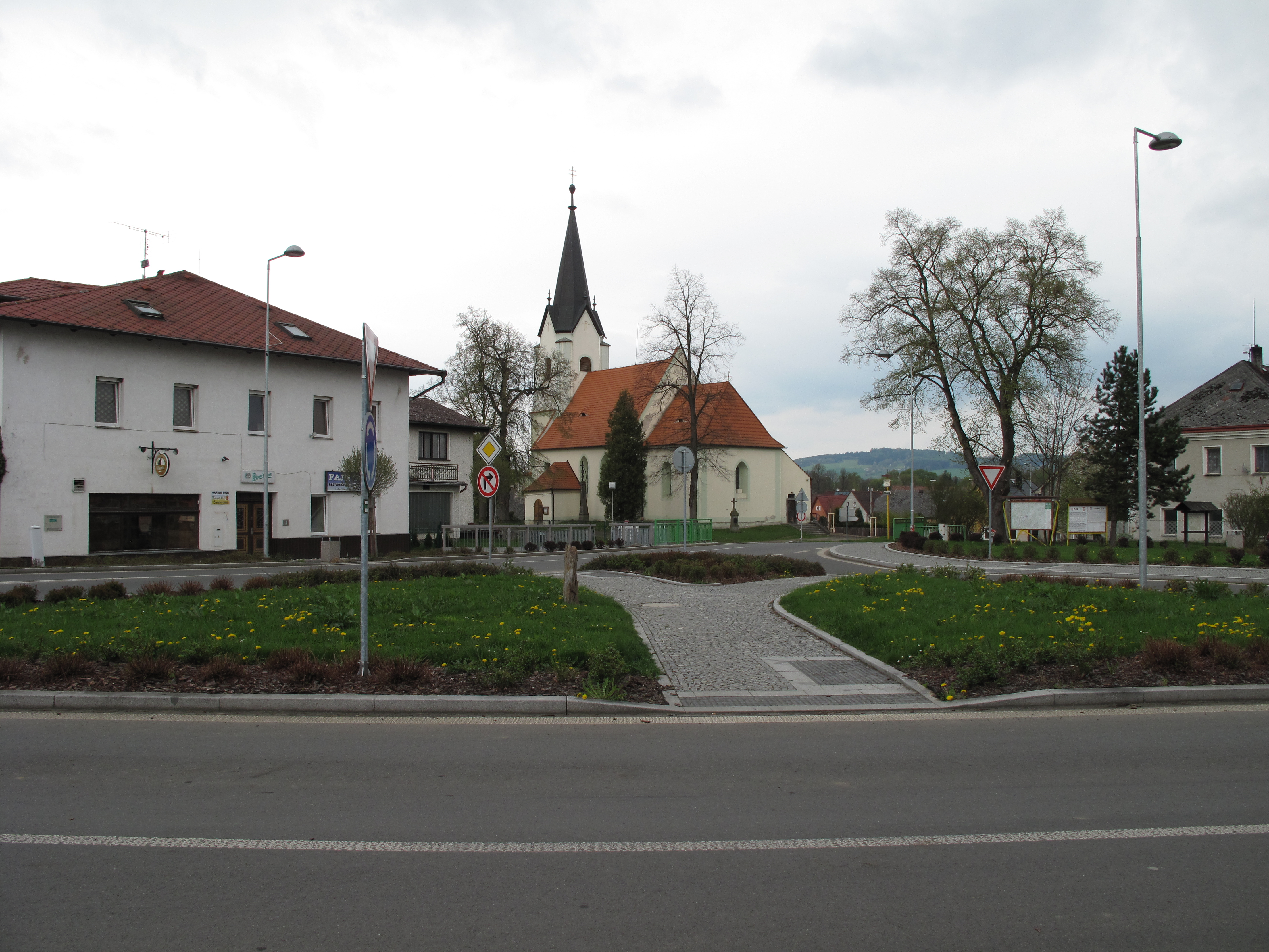 Janovice nad Úhlavou. Okres Klatovy, Česká republika.